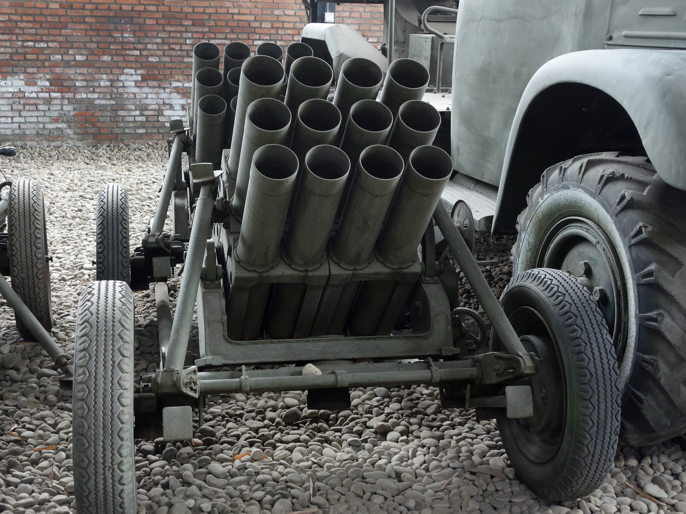 63式107mm多管火箭炮